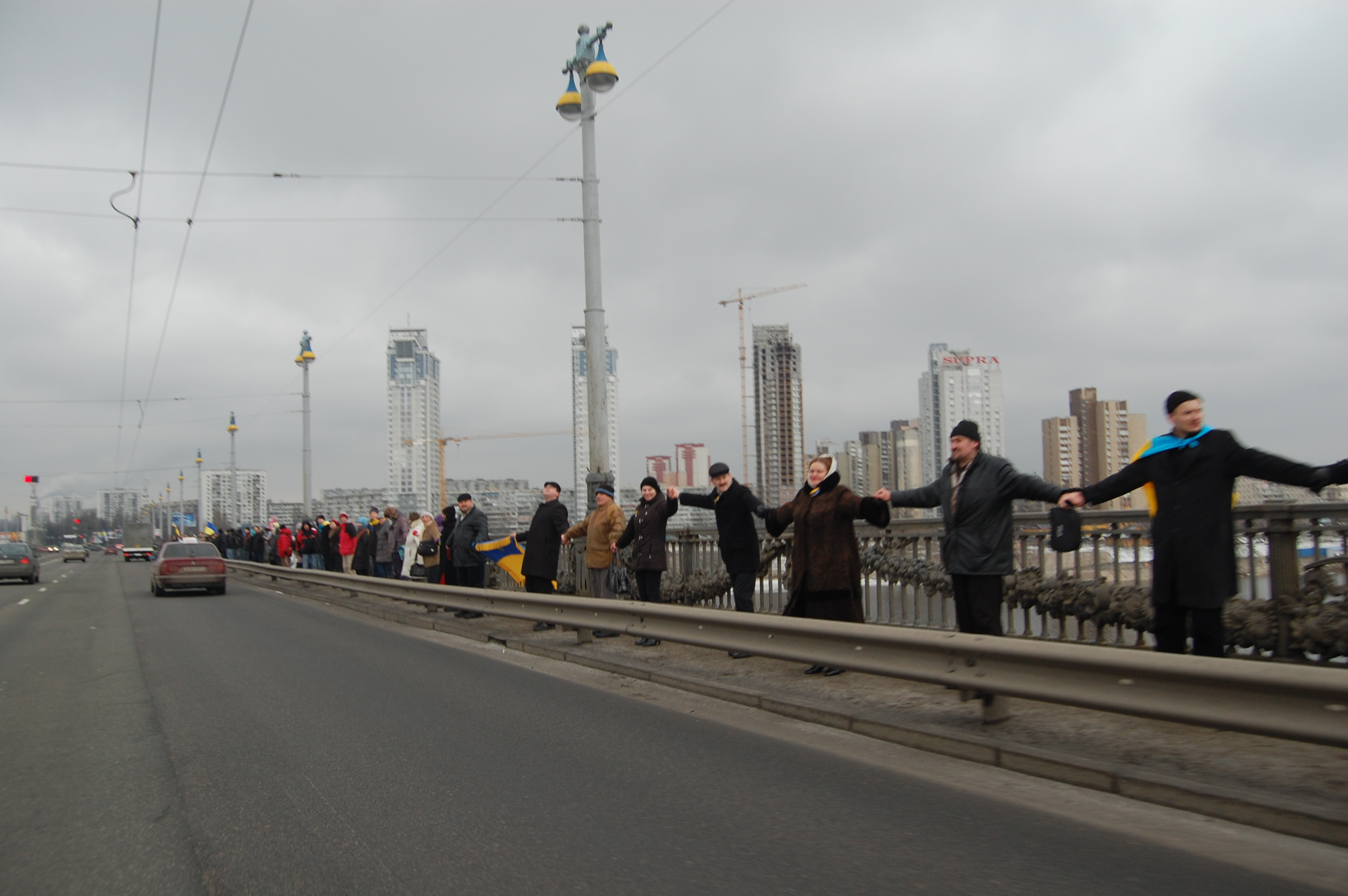 Dzień Jedności Ukrainy 2011